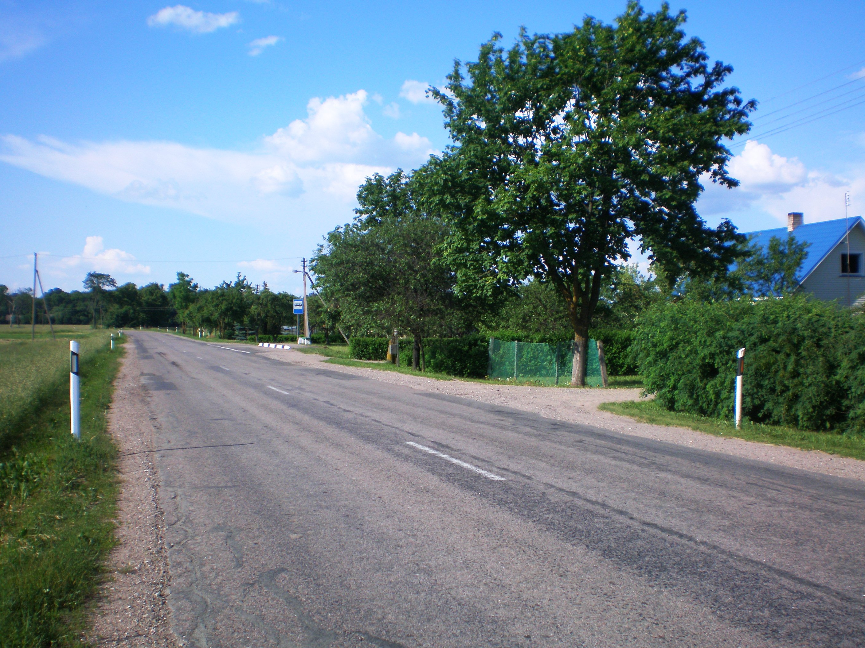 Vitėnai village, Lithuania